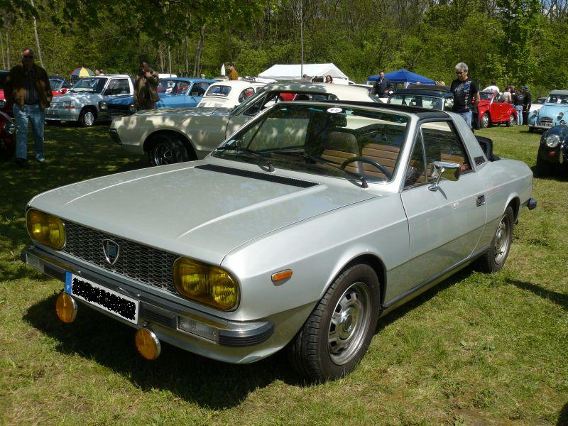 Photo prise le 1er Mai 2012 à Chelles.